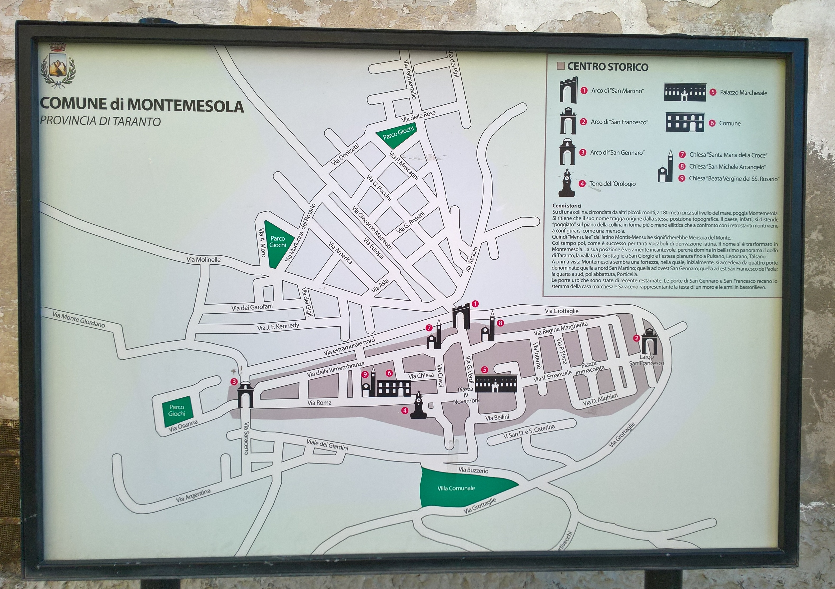 Mappa di Montemesola con centro storico